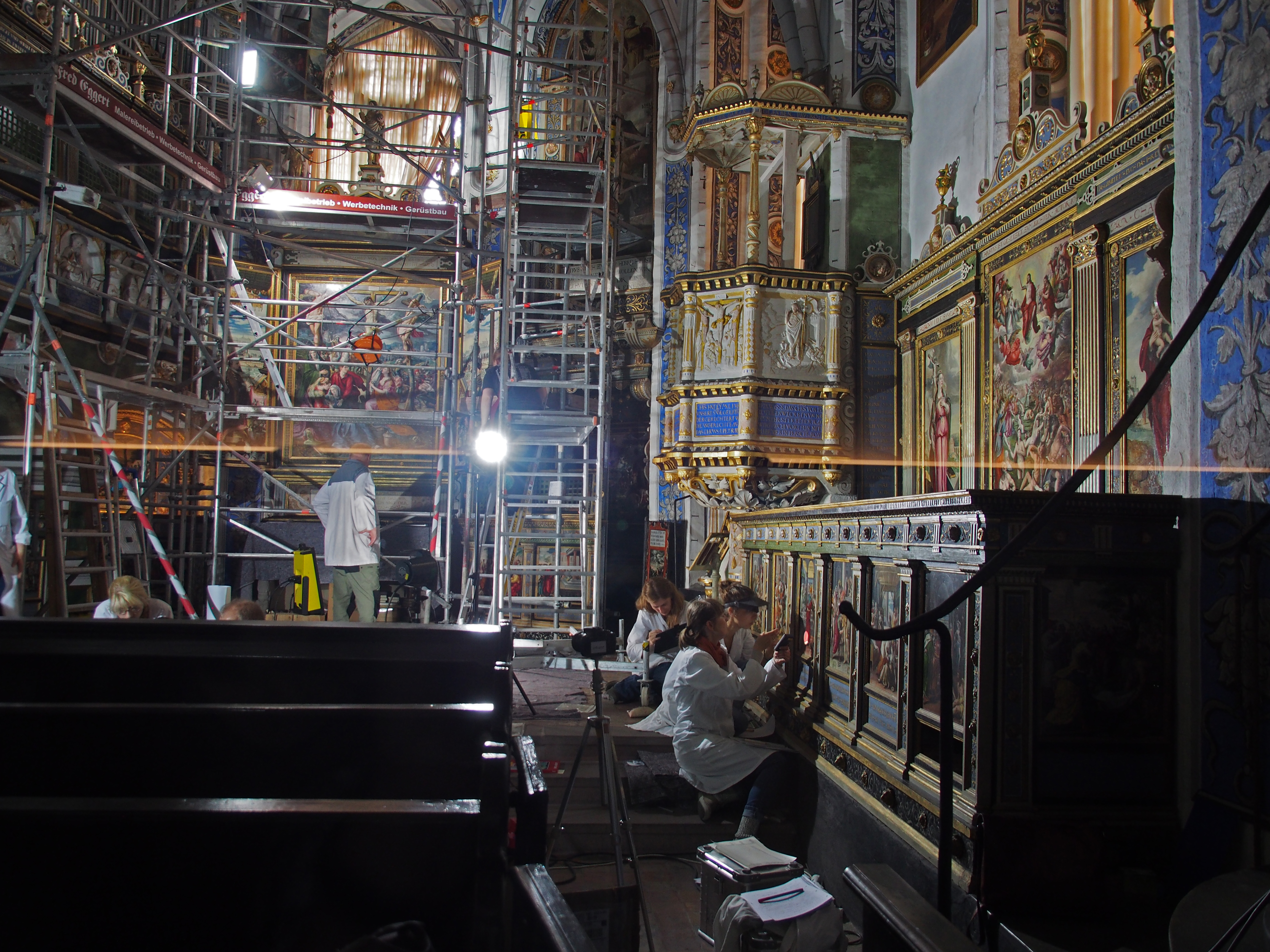 Inneres der Schlosskapelle im Schloss Celle, Schaden-Bestandsaufnahme